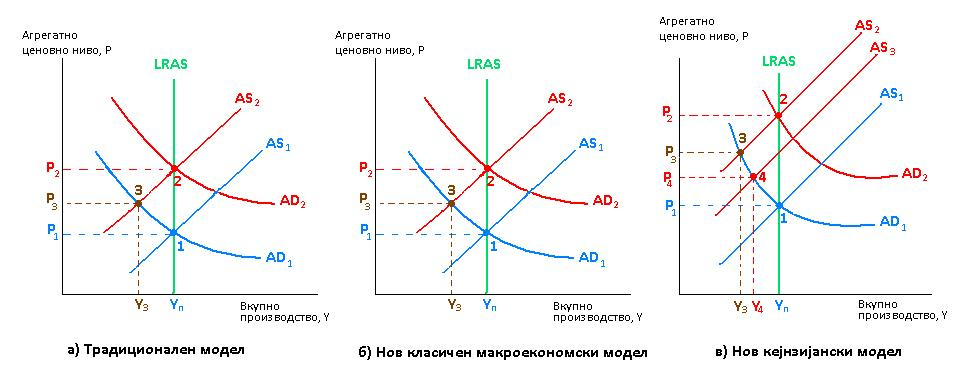 дијаграм